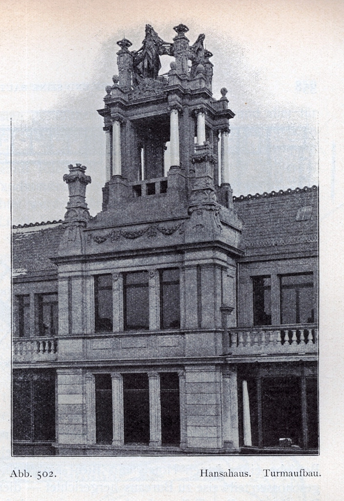 Geschäftshaus "Hansahaus" am Wilhelmsplatz in Düsseldorf, für die "Rheinische Immobiliengesellschaft Hansa", von Architekt Heinrich Ernst 1900 bis 1902 erbaut, Turmaufbau